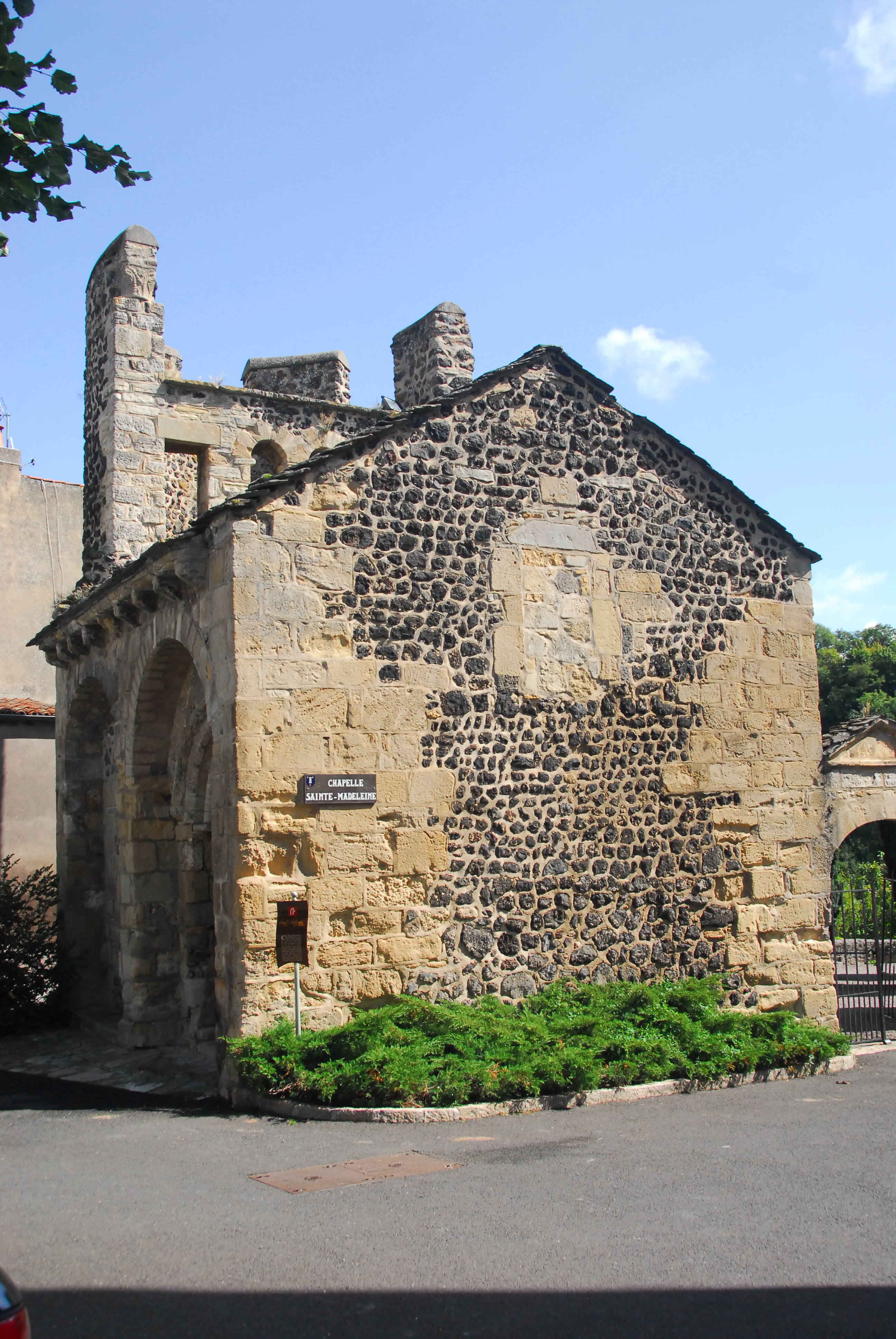 Saint-Saturnin, Chap. St-Madeleine